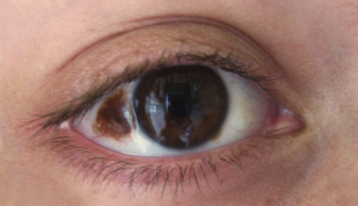 Nevo de Ota.